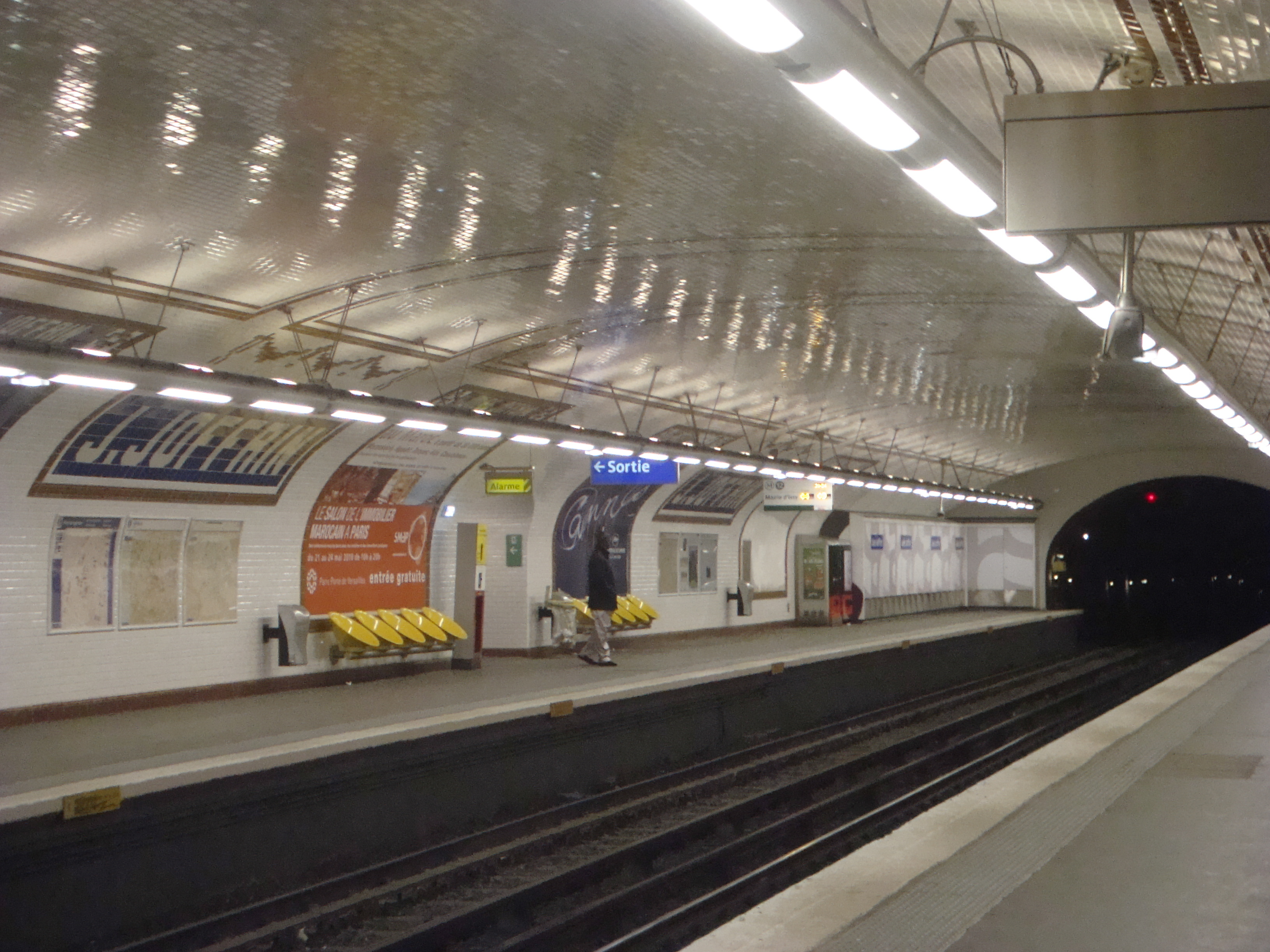 Les quais de la station Jules Joffrin.